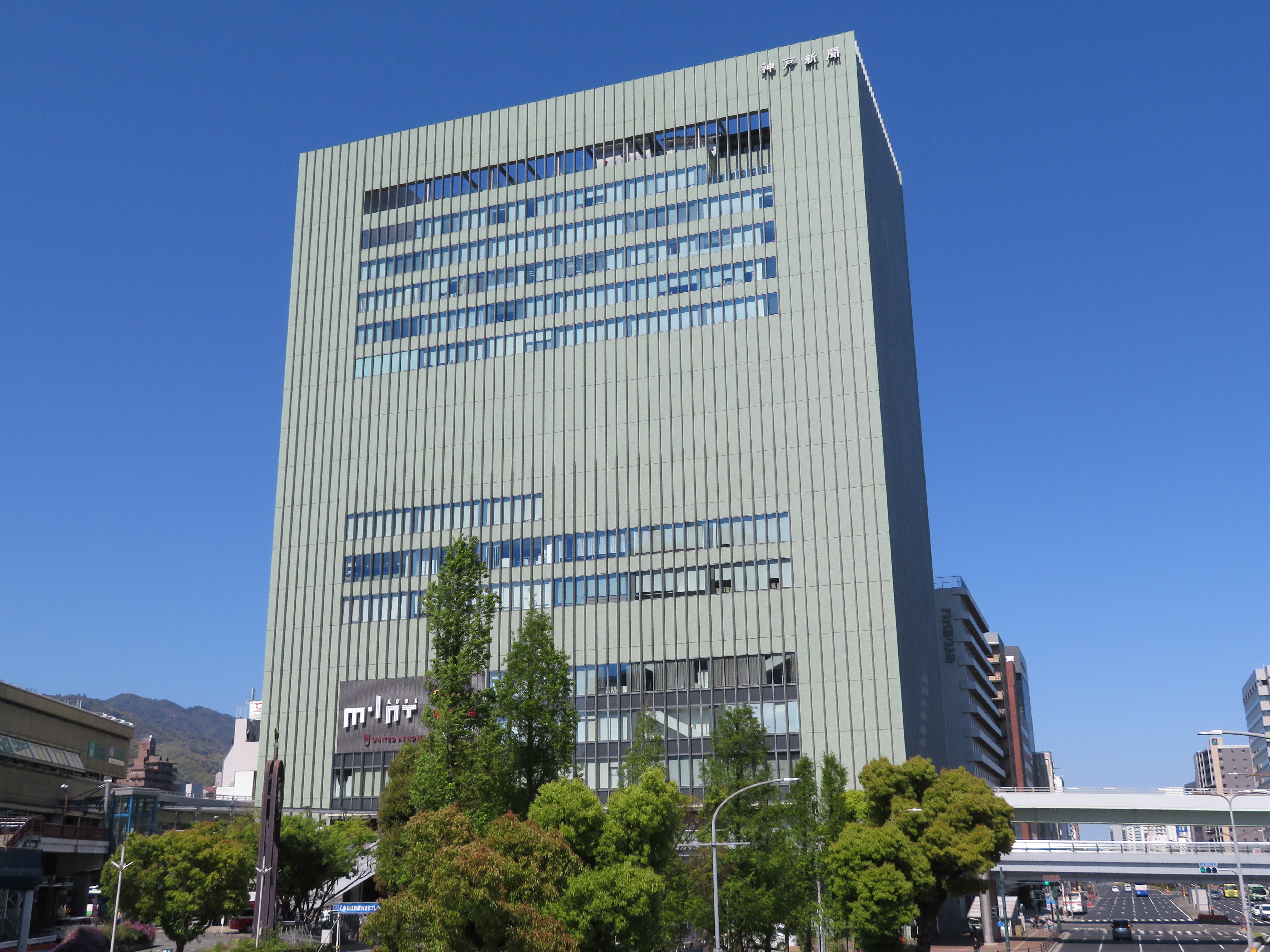 ミント神戸